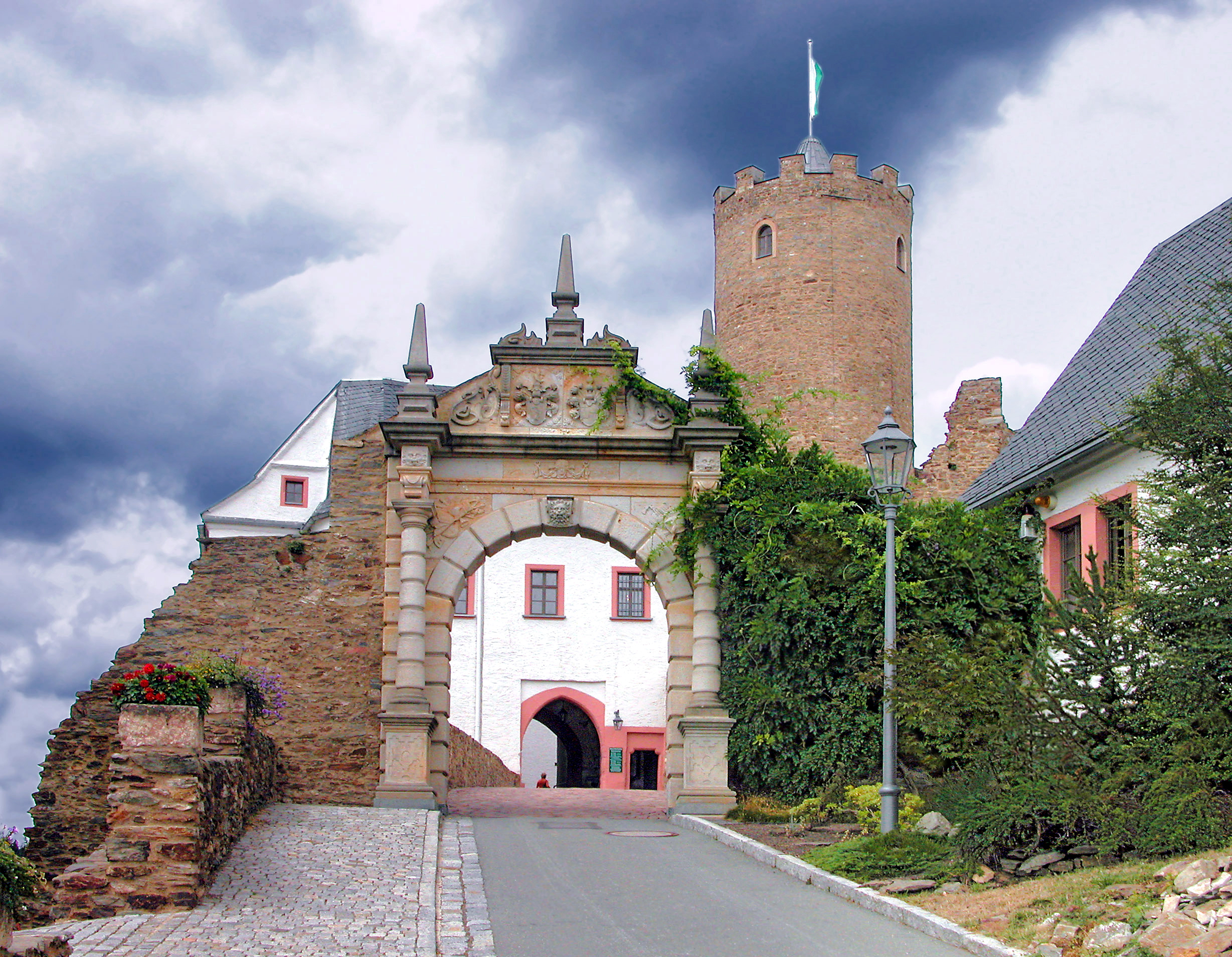 03.08.2006 09430 Scharfenstein (Drebach), Schloßberg 1 (GMP: 50.704770,13.055352): Burg, Ersterwähnung 1349/50. Wiederaufbau von 1921/22 nach Brand. In der DDR Jugendwerkhof und Kinderheim. Heute Museum. Aufgang zum Schloß von Süden. [DSCN10871.TIF]20060803330DR.JPG(c)Blobelt